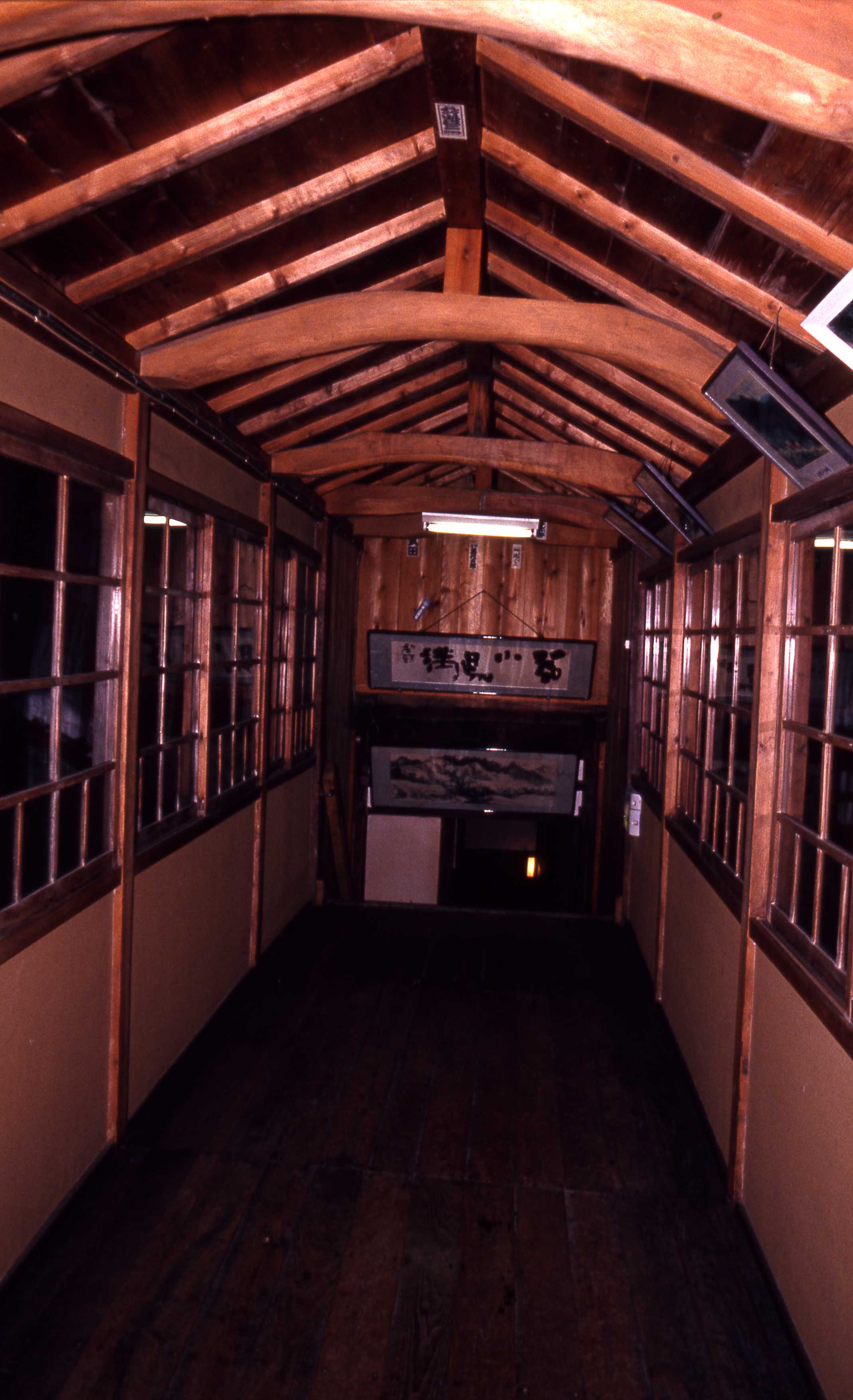 法師温泉廊下